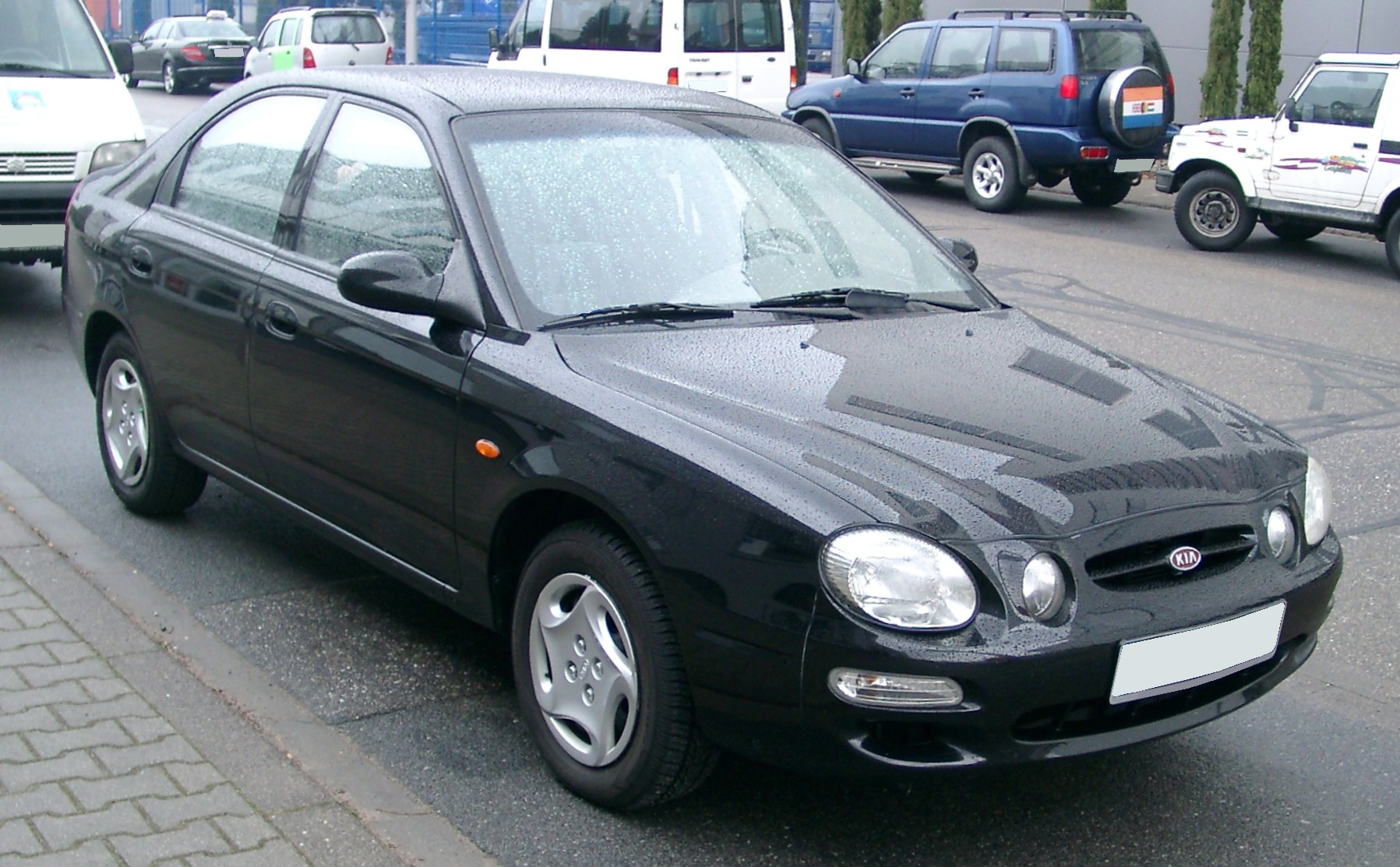 Kia Shuma